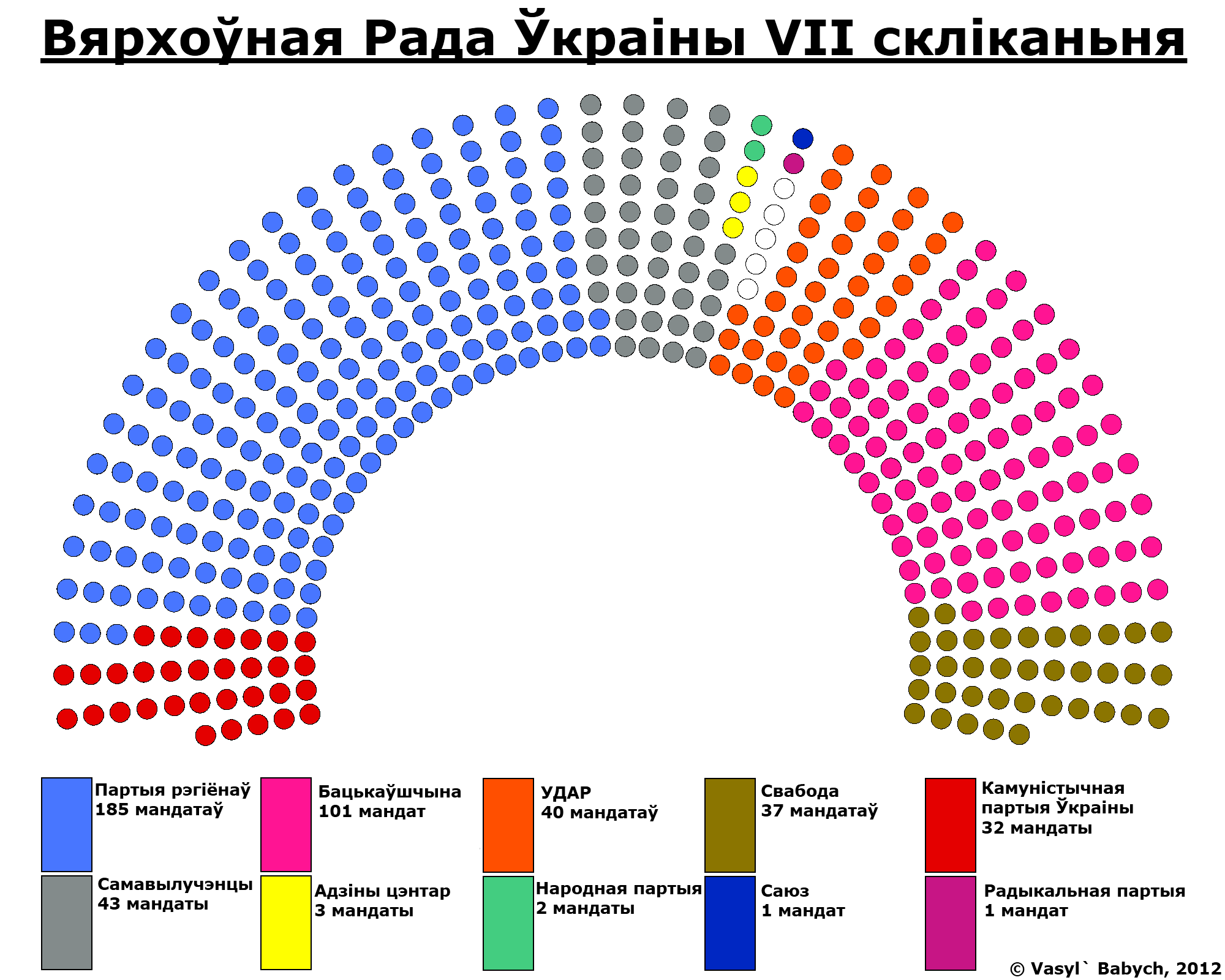 Беларуская (тарашкевіца): Размеркаваньне дэпутацкіх мандатаў ў Вярхоўнай Радзе Ўкраіны па выніках выбараў 2012 году.